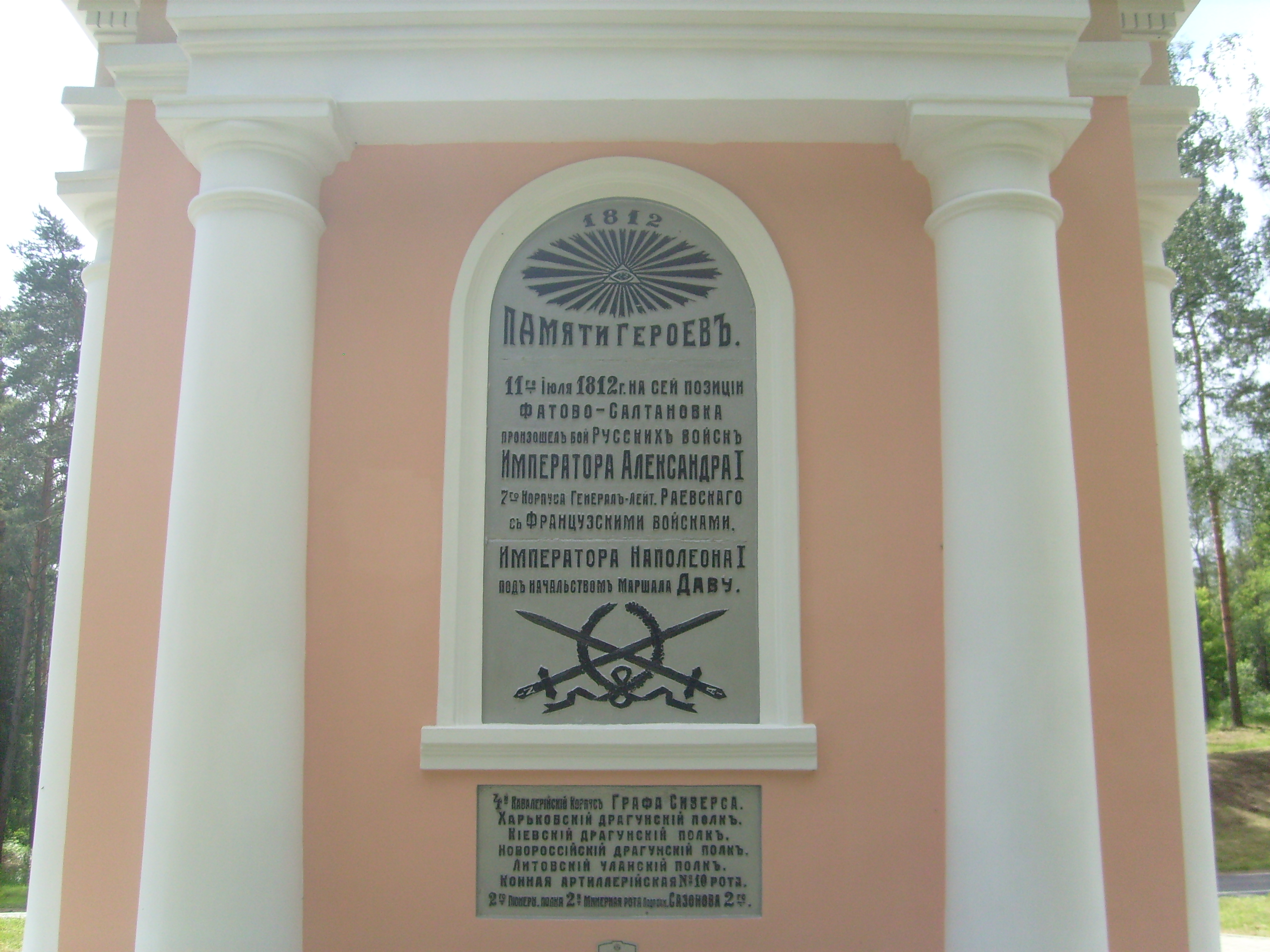 Мемориальная часовня в память об Отечественной войне 1812 года (построена в 1912 году)